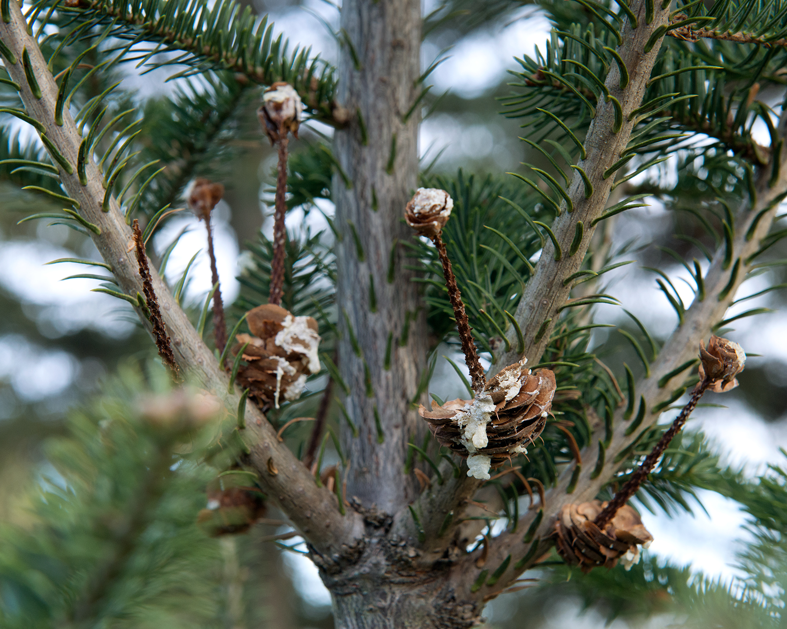 Abies balsamaea (Balsam Fir)